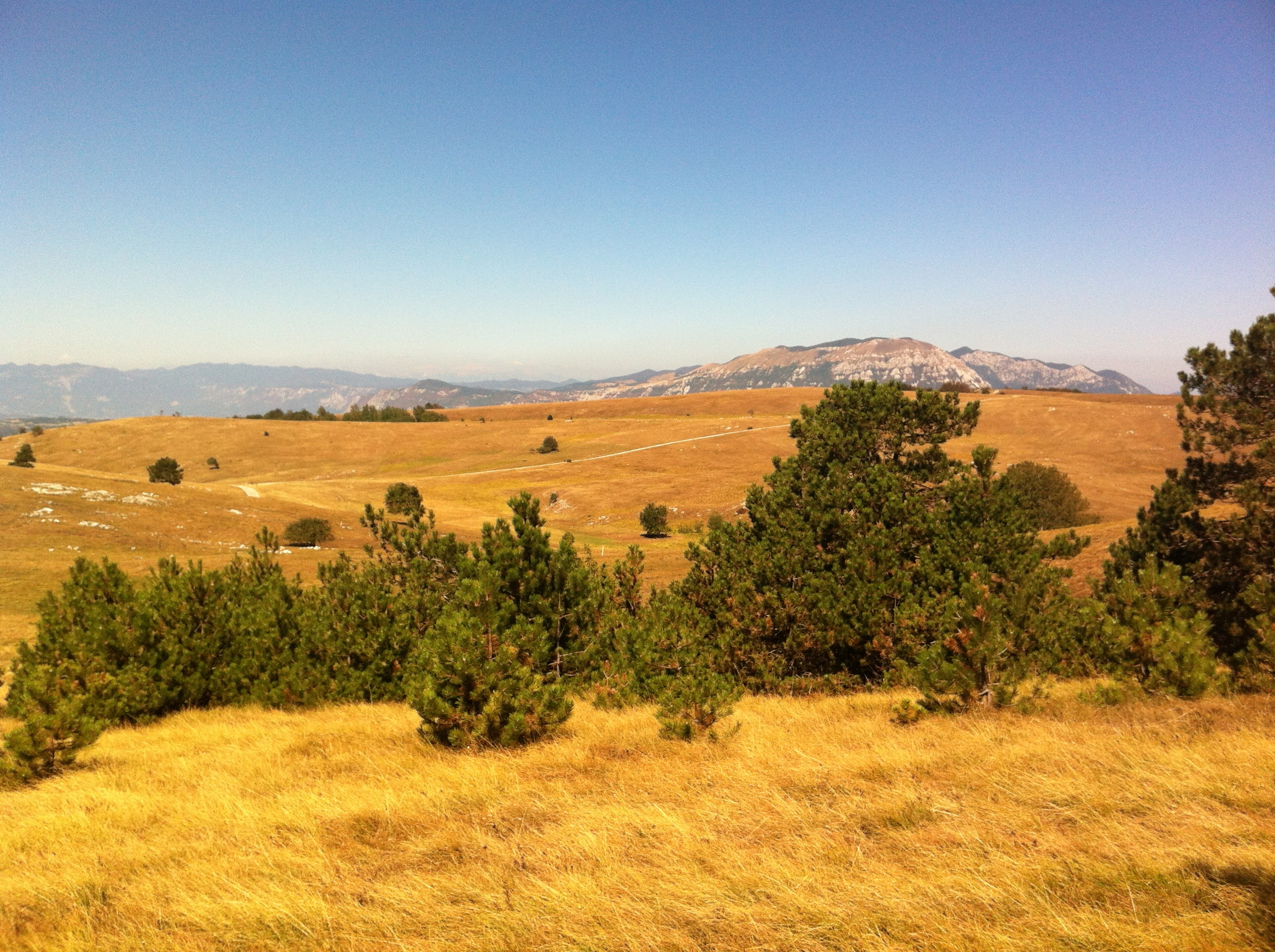 mount Vremščica